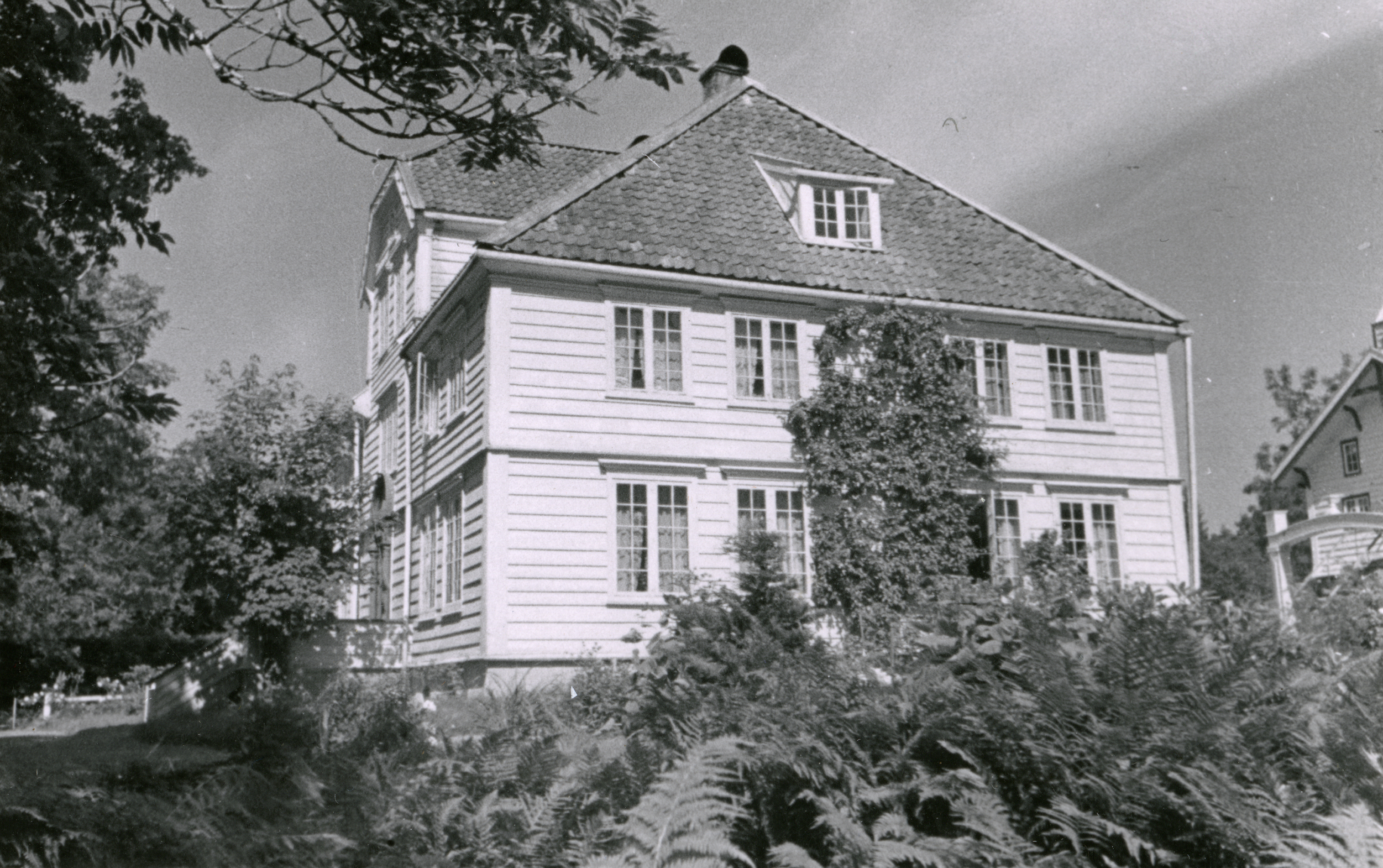 Solnør i Skodje, Møre og Romsdal This image on crowdsourcing geotagging platform Fotodugnad